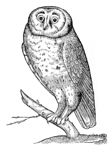 Sujet : Chouette de Gessner (1555) Source : Gravure du XVI siècle, tombée dans le domaine public. Tirée d’Histoire animalium de Conrad Gessner. Artiste : Inconnu.